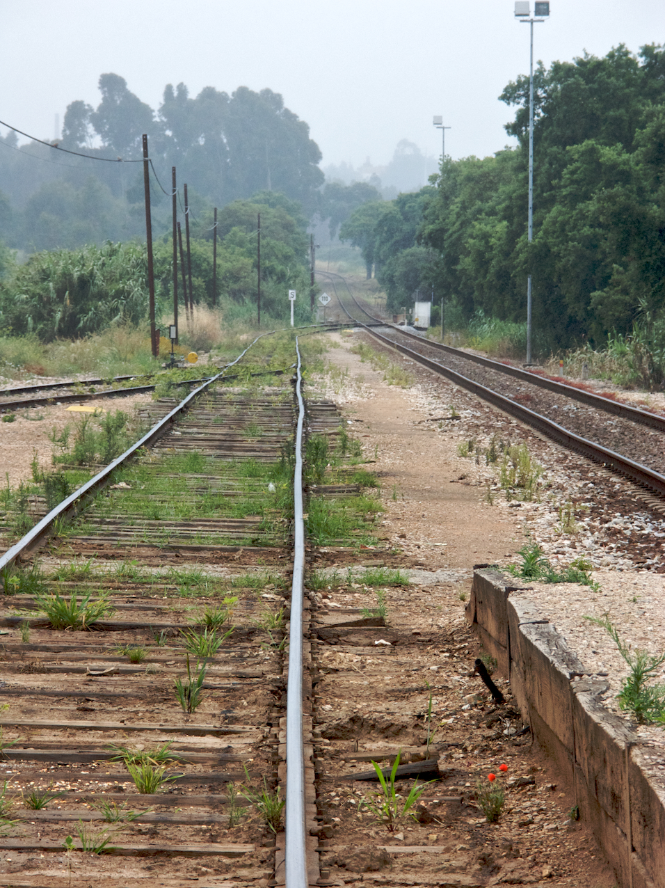 Via férrea: Linha do Oeste [PK 71] Local: Estação do Ramalhal Data e hora: 15 de Junho de 2008 [17h32] Sentido: Cacém